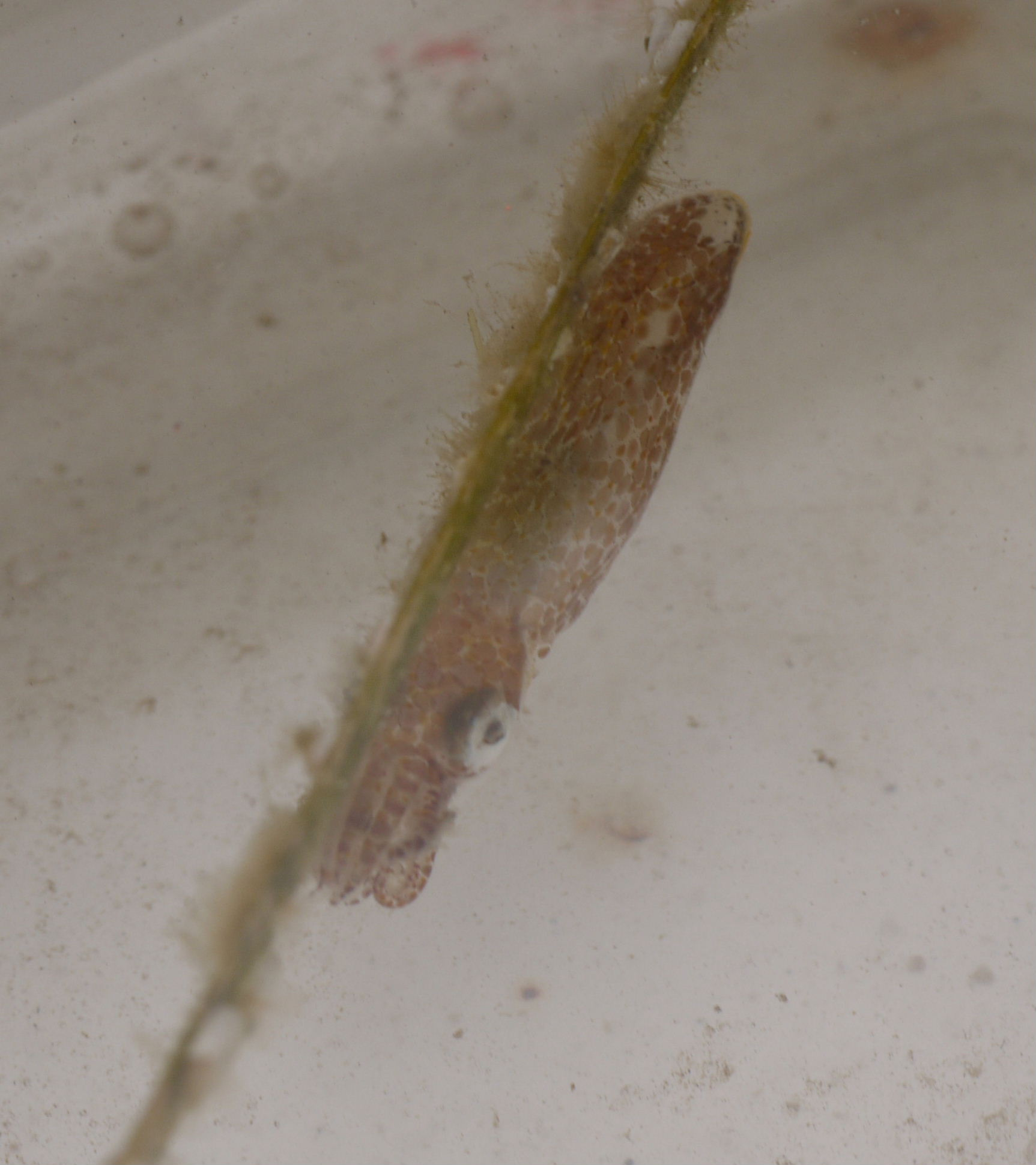 Idiosepius paradoxus：ヒメイカ 2015/05/03 和歌山県田辺市：Tanabe City. Wakayama Pref. Japan